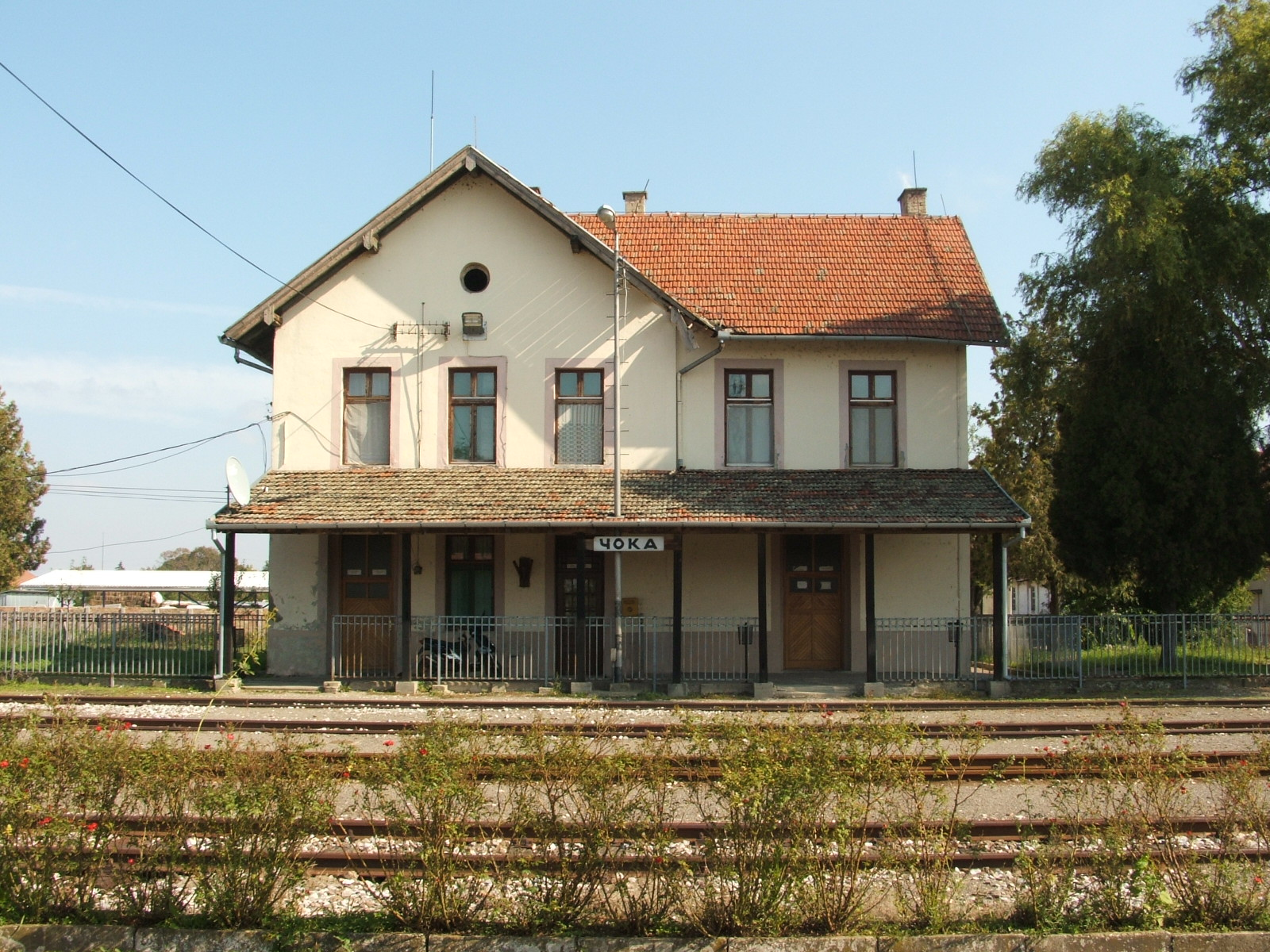 Csóka vasútállomása